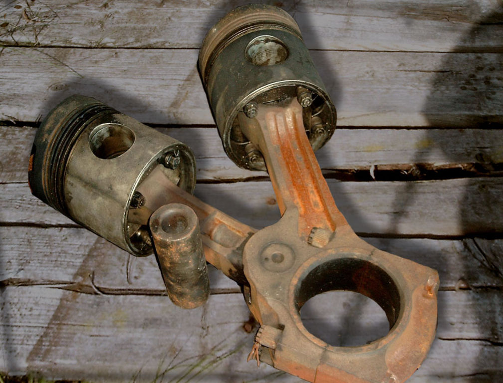 Pleuel Dieselmotor 1-5D 49, sowjetische Diesellok TE109. DR Baureihe 130-142.(Ludmilla) 260 Millimeter Kolbendurchmesser.